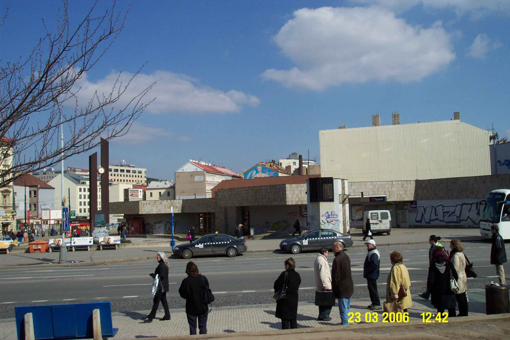 Praha, Nové Město a Karlín: pohled přes ulici Ke Štvanici s autobusovými zastávkami Florenc na budovu vstupu stanice metra Florenc